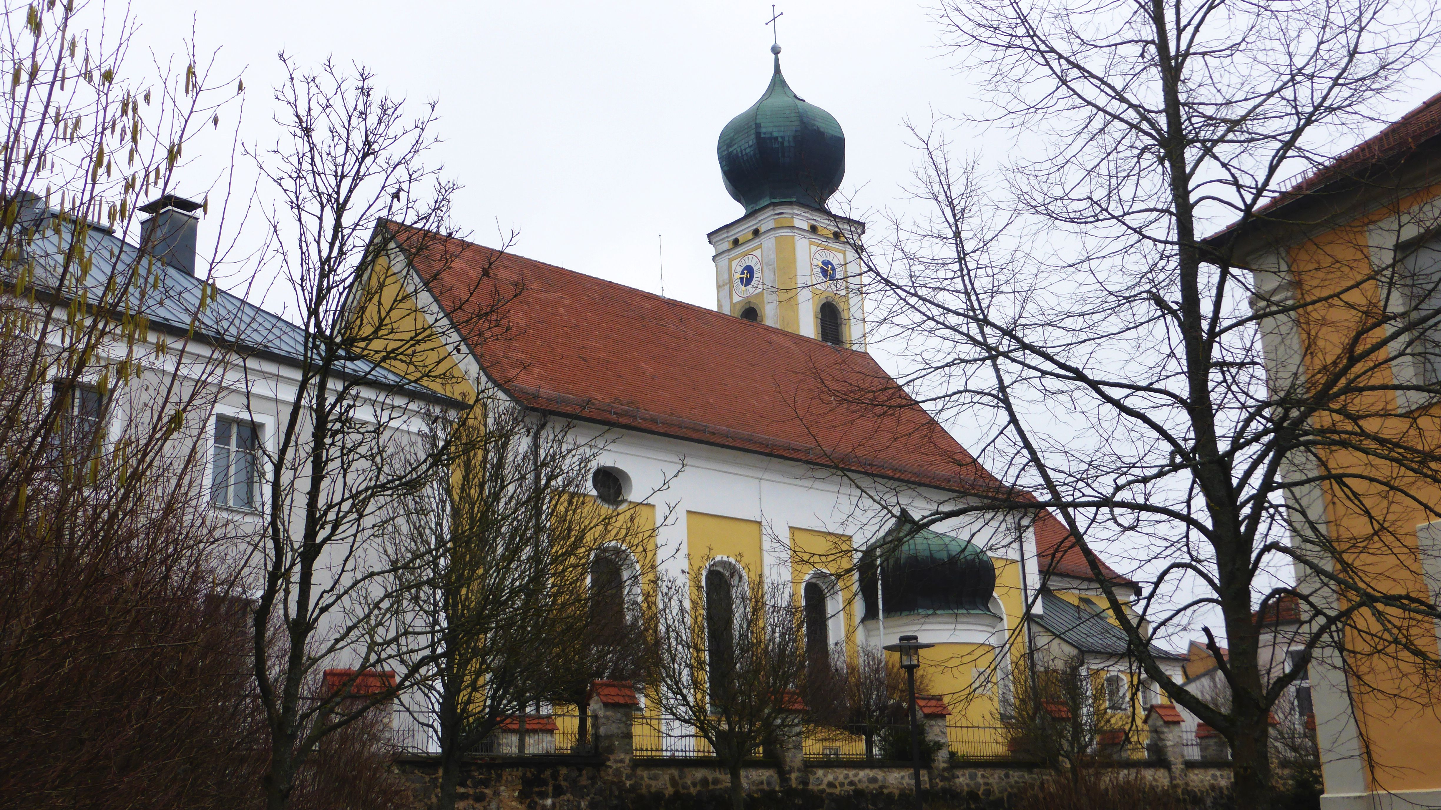 Pfarrkirche St. Johannes der Täufer (Hemau)